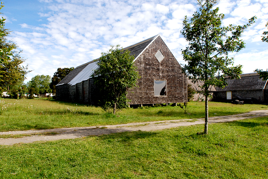 Museo de Arte Moderno Chiloé